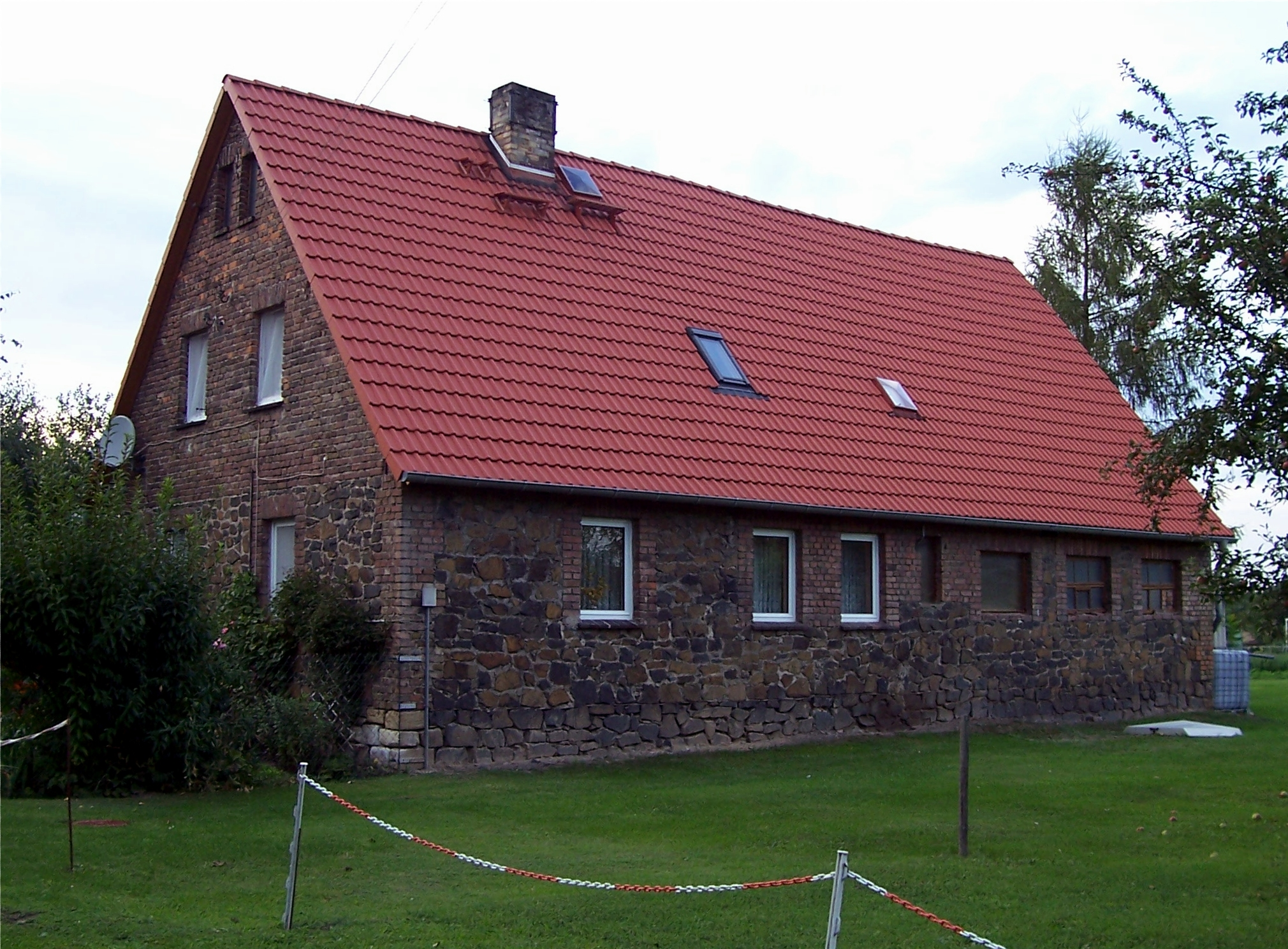 Feldsteinhaus in der Gemeinde Elstertrebnitz